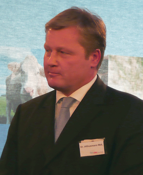 Bernd Althusmann, deutscher Politiker (CDU)